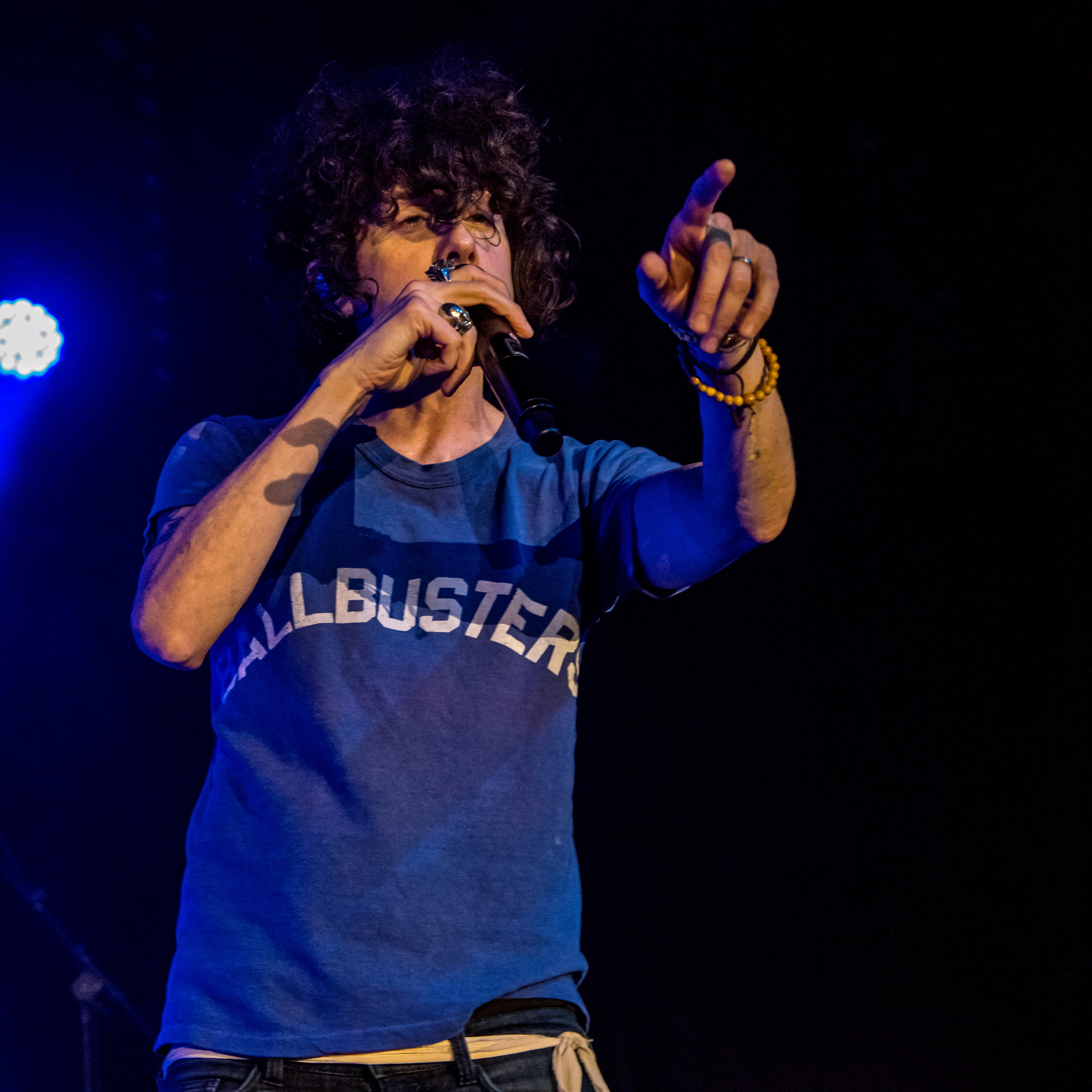 Bilder vom Zelt Musik Festival 2018 in Freiburg im Breisgau LP am 28.07.2018 im Zirkuszelt